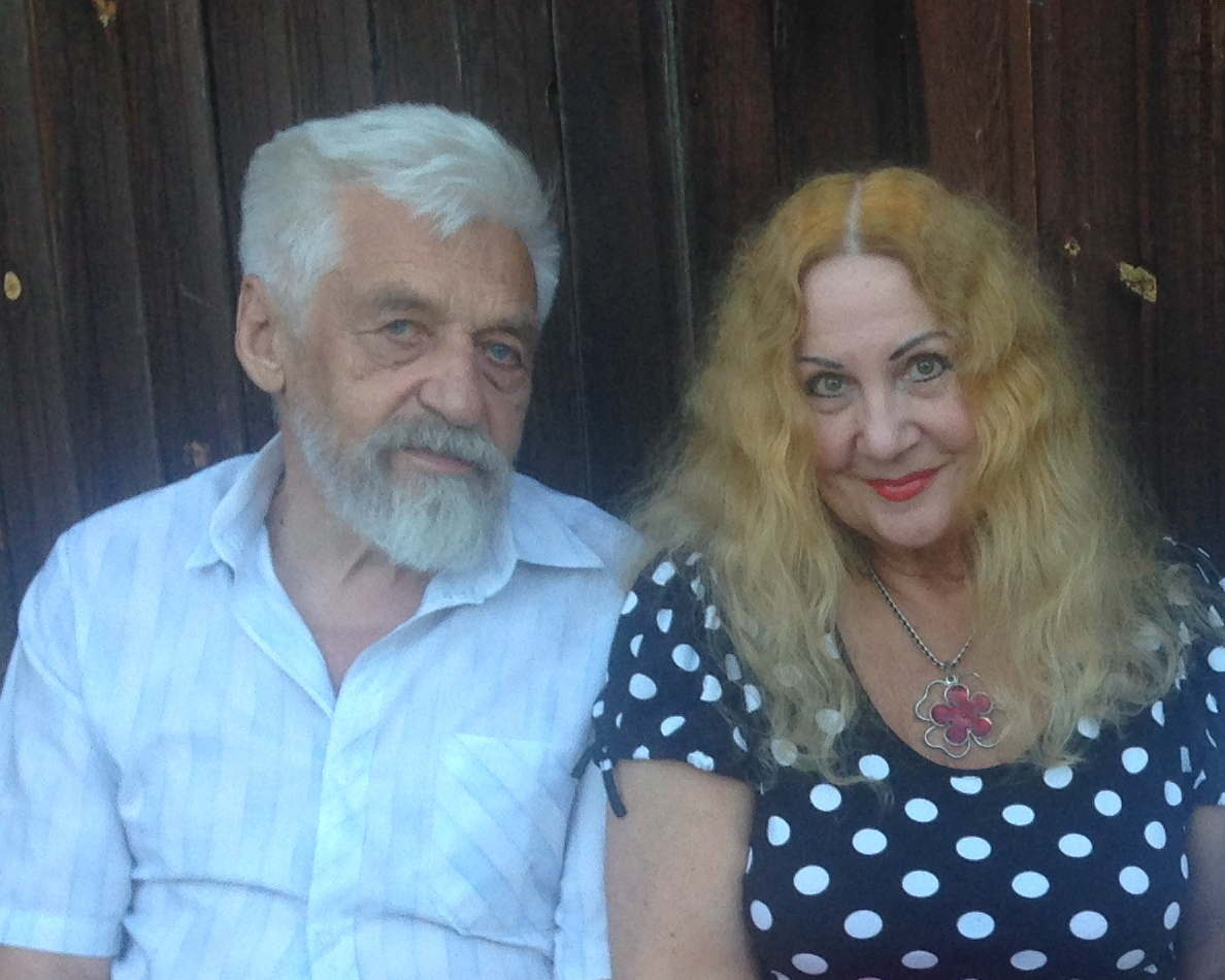 Владимир Александрович Овчинников (род. 1938) — художник, краевед, общественный деятель, создатель настенной живописи в городе Боровске. Эльвира Николаевна Частикова (род. 1946) — поэт, заслуженный работник культуры Российской Федерации.